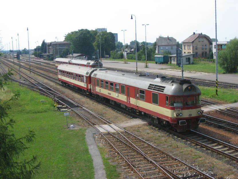 Motorový vůz řady 854, stanice Ostroměř